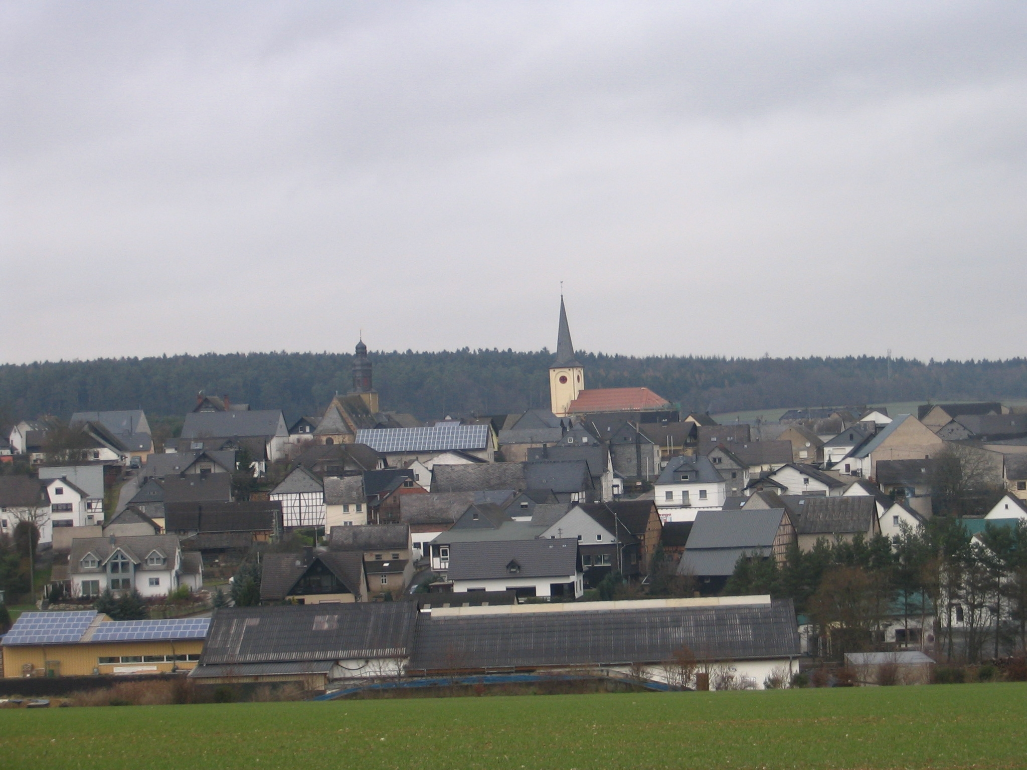 Dickenschied aus Richtung Süden